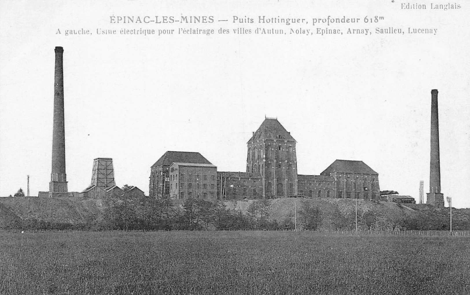 Le puits Hottinger (Houillères d’Épinac, France).